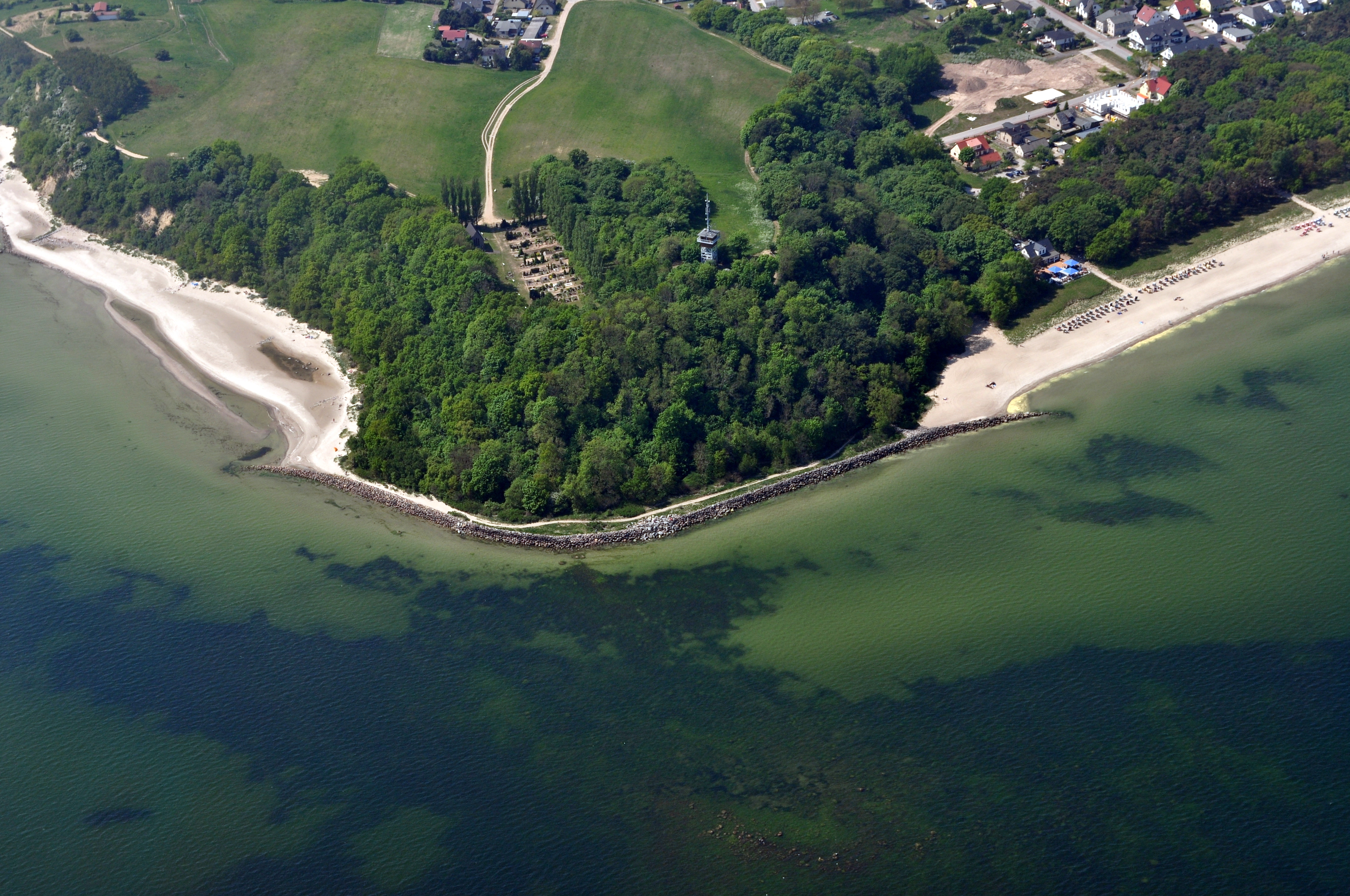 Die Bilder wurden von mir während eines einstündigen Rundflugs ab Flugplatz Güttin am 21. Mai 2011 aufgenommen. Die Bildbeschreibung steht im Dateinamen. Aufgenommen mit einer Nikon D5000 durch das Seitenfenster des Flugzeugs.